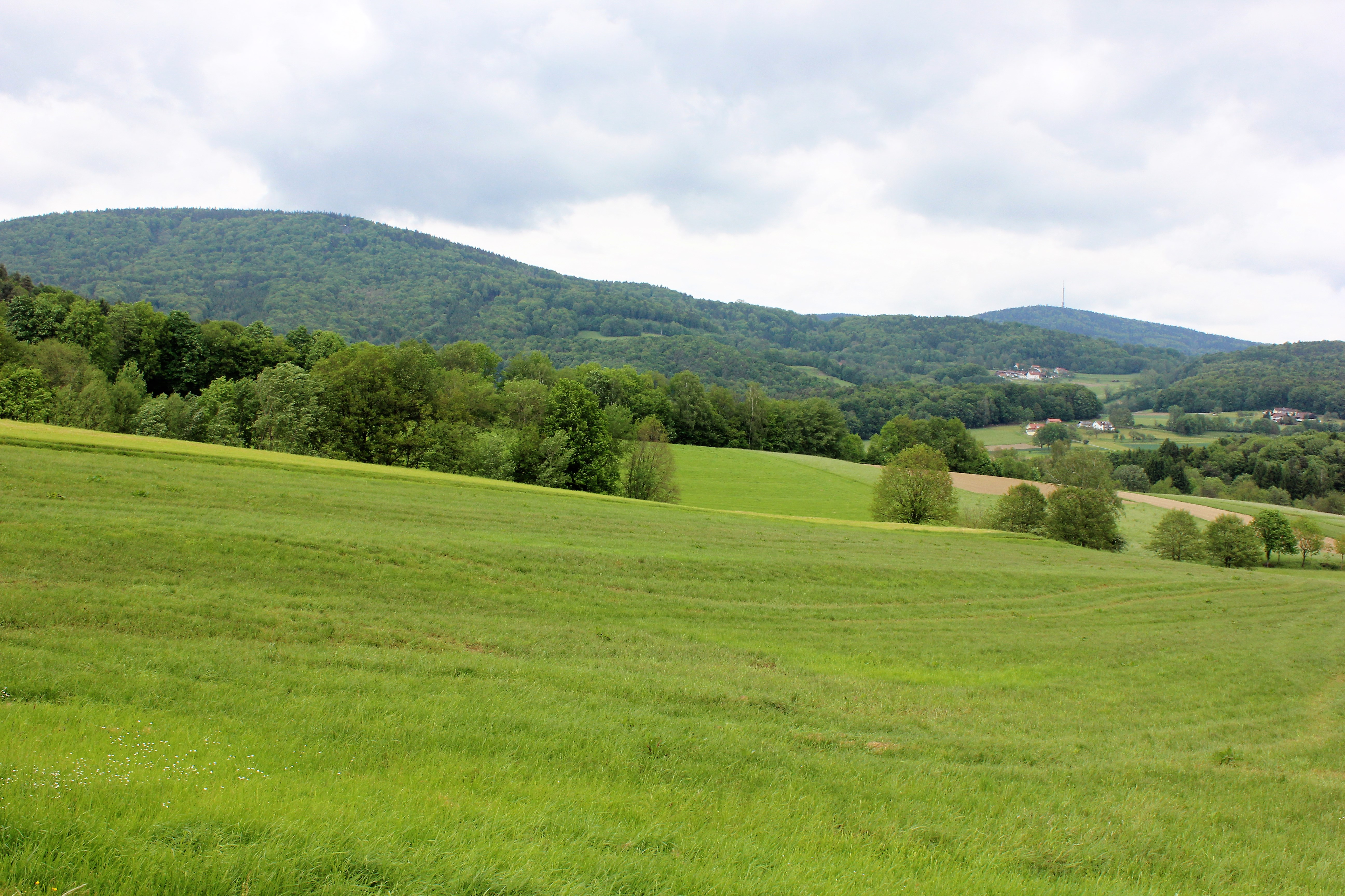 FFH-Gebiet "Wiesengebiete und Wälder um den Brotjacklriegel und Schöllnach. Landkreis Deggendorf.